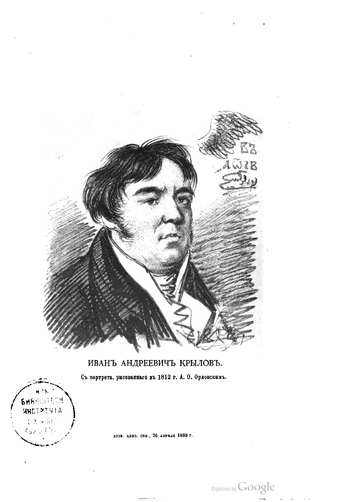 Иван Андреевич Крылов. С портрета рисованного в 1812 г. А. О. Орловским